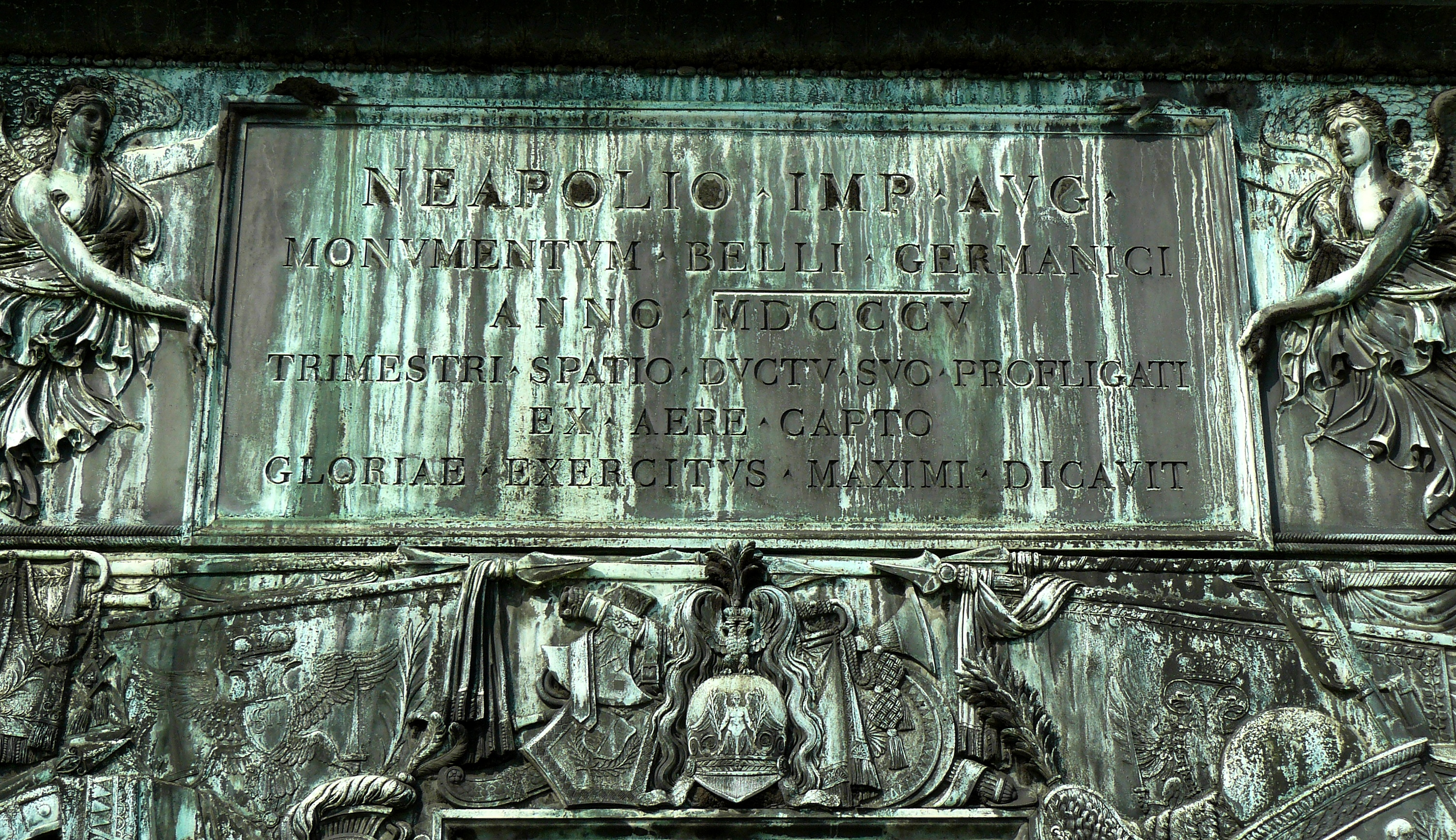 Dédicace en latin sur le socle (au dessus de la porte d'accès, coté sud) de la Colonne Vendôme à Paris.